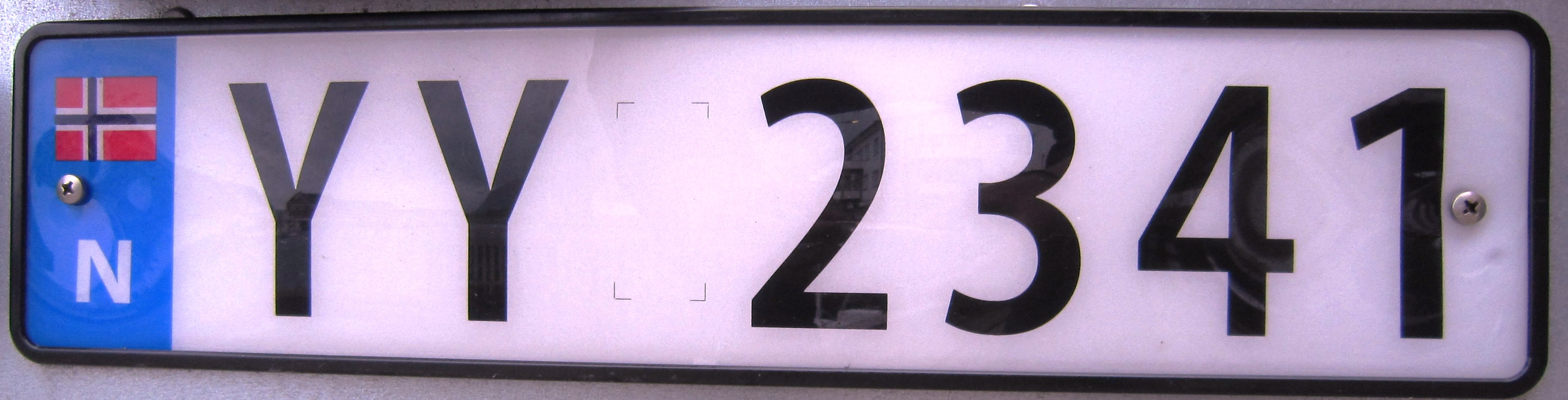 Noorwegen kenteken nieuw aanhanger